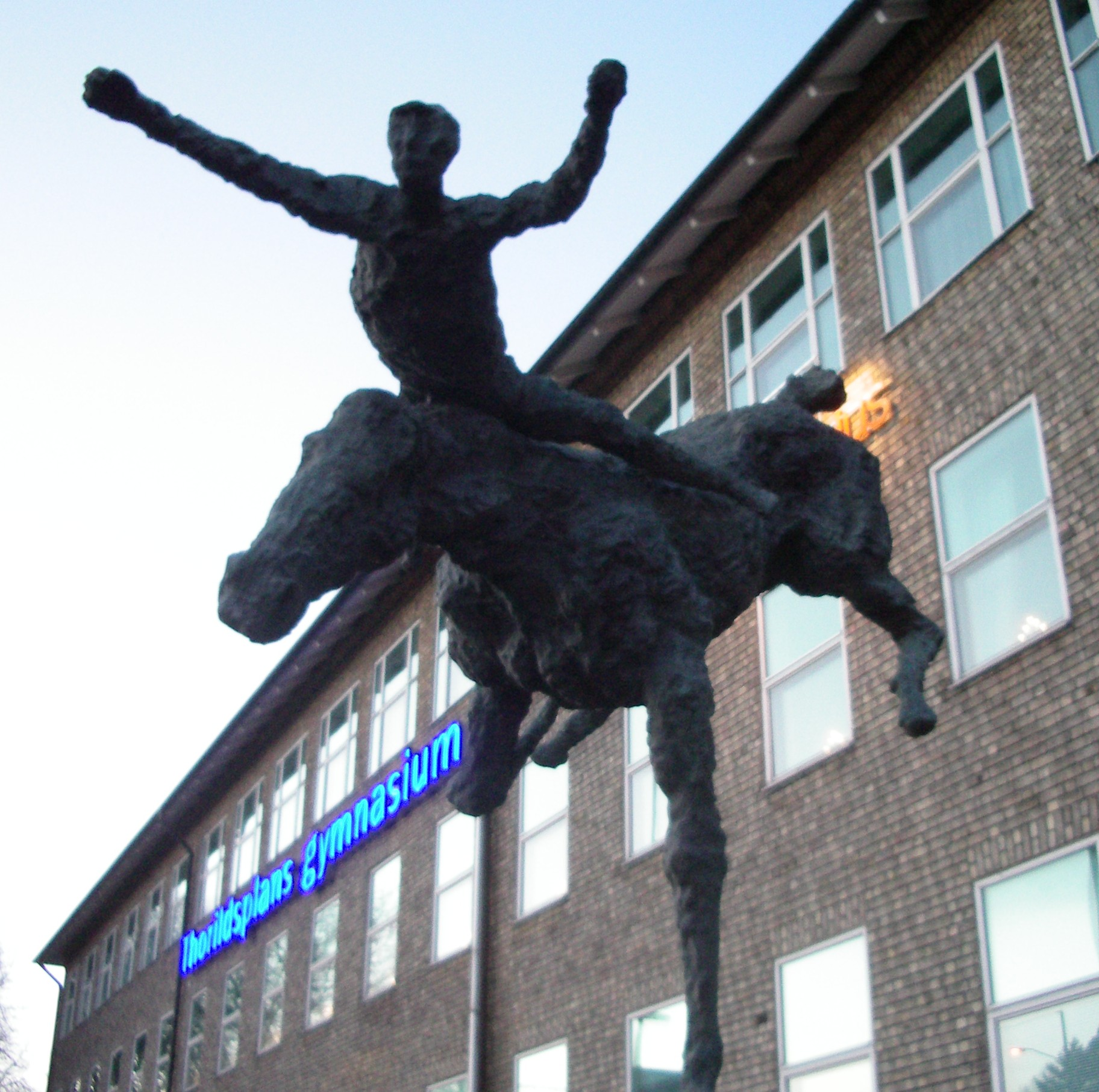 Asmund Arle (swedish, 1918-1990): Häst och ryttare, Drottningsholmsvägen vid Thorildsplans gymnasium, Stockholm. Asmund Arle´s Horse and rider, outside Thorildsplan High School, Drottningsholmsvägen, Stockholm.